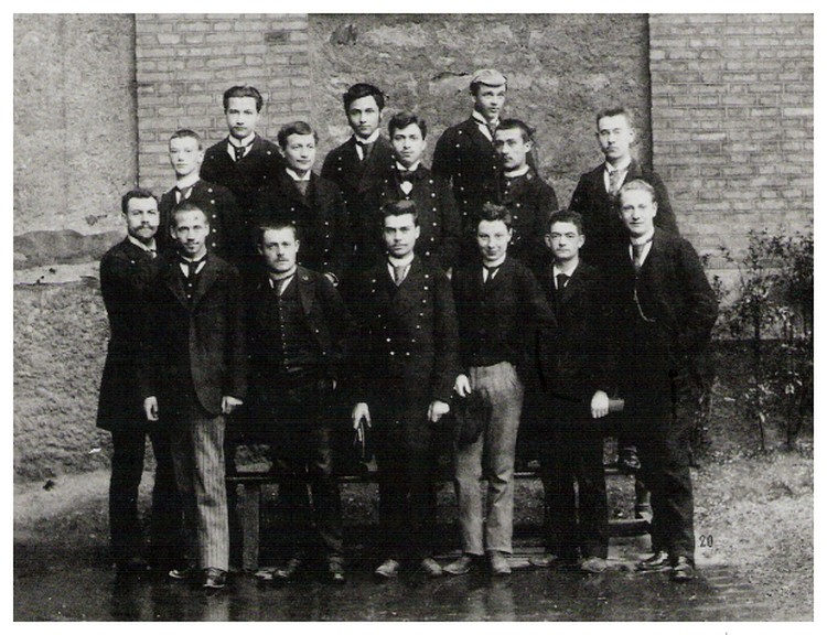 Charles Péguy en classe préparatoire au collège Sainte-Barbe (Paris) en 1894 (1er rang, 3ème depuis la droite), photographe inconnu.